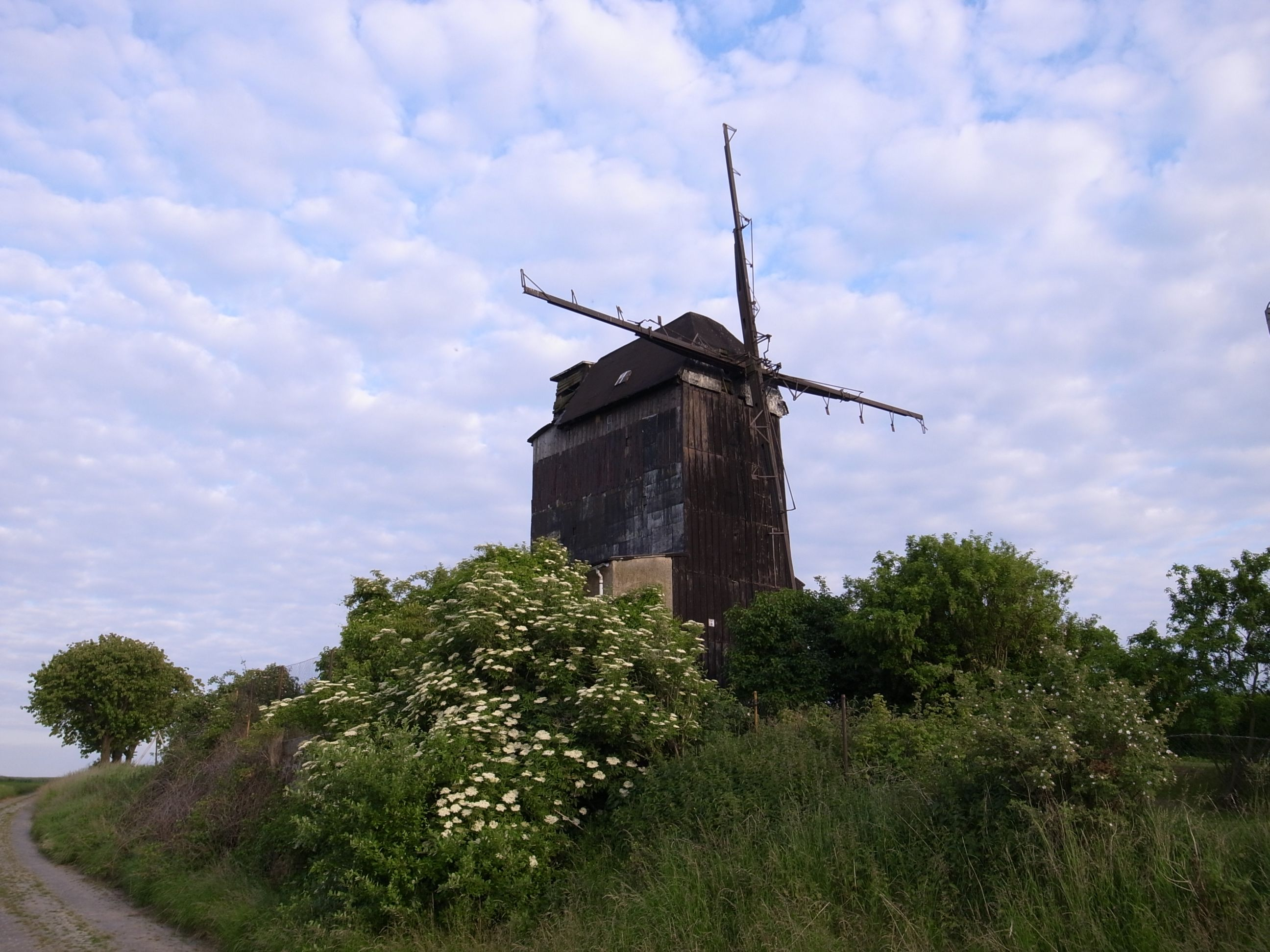 Gatterstädt, Windmühle